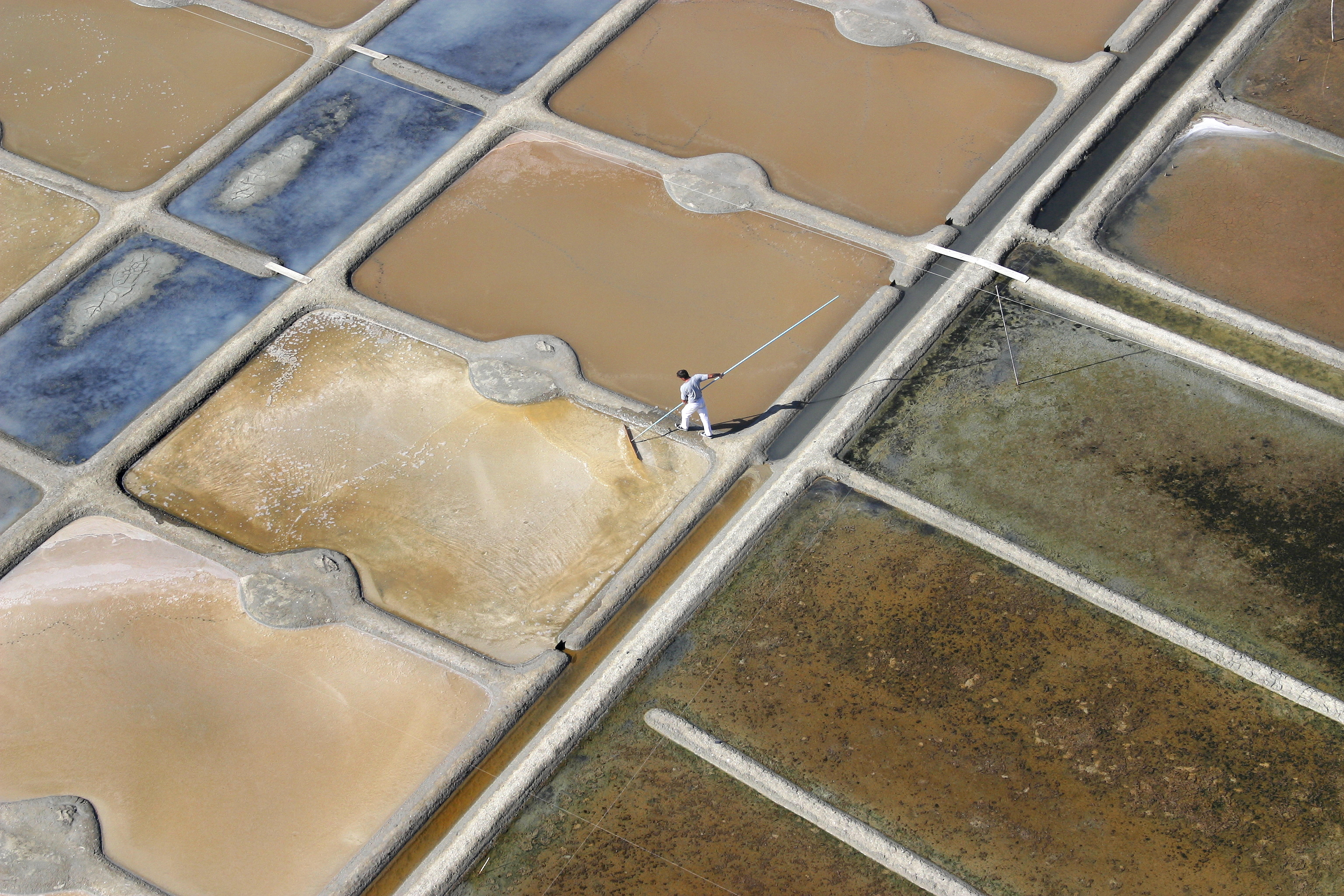 Marais-salants